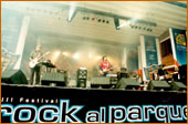 rock al parque 2002